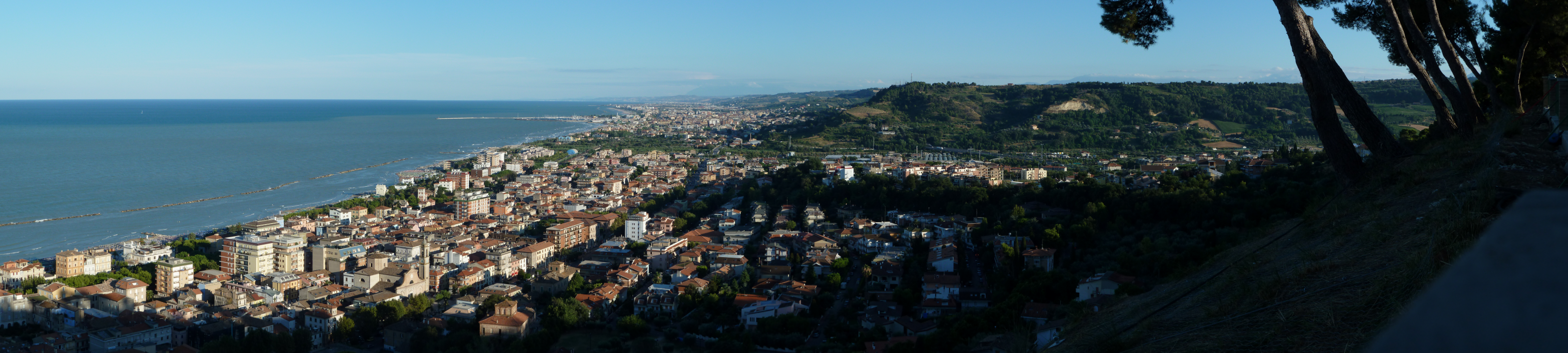 Panorama della città di San Benedetto del Tronto.